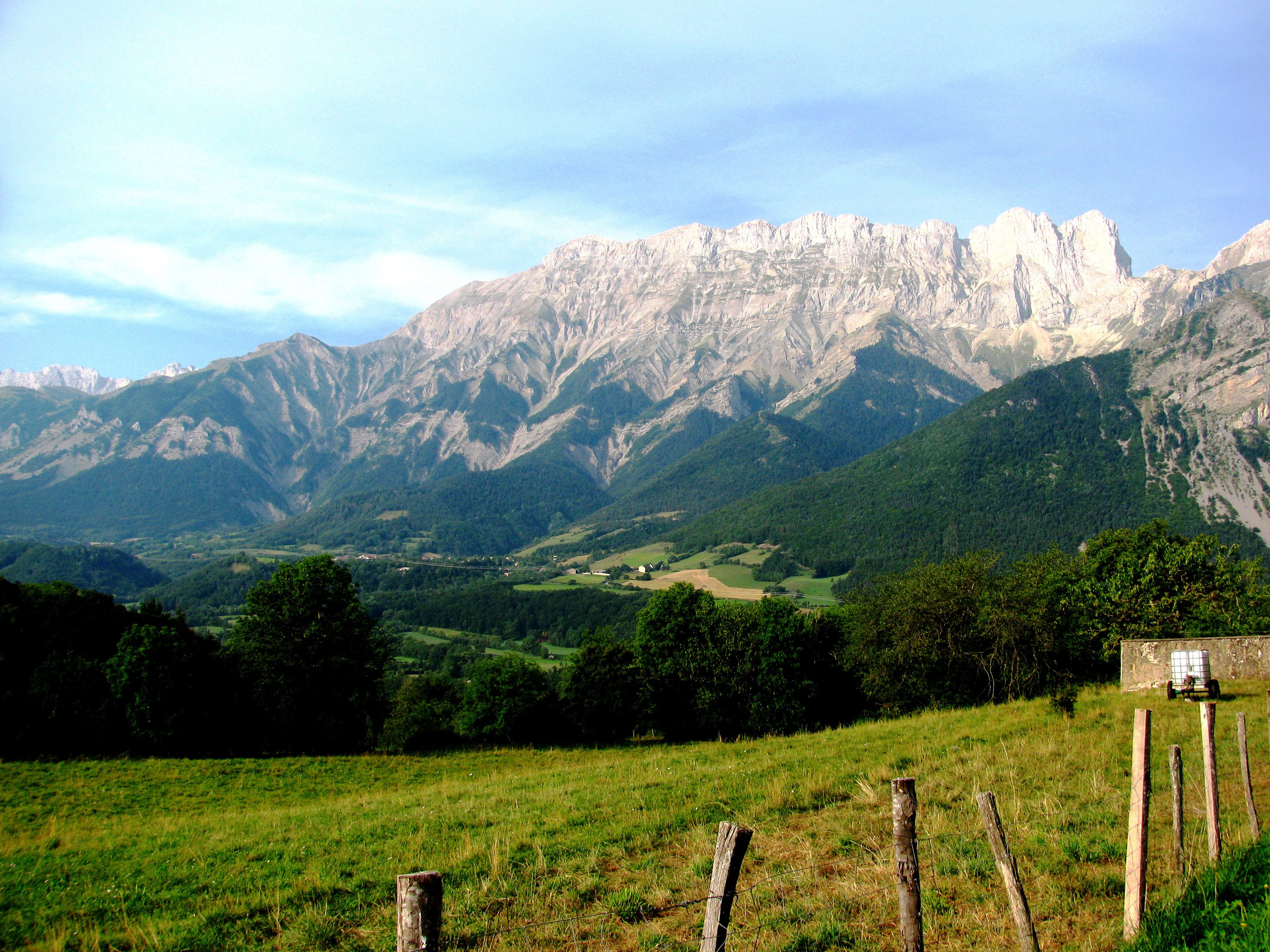 Paysage de Chauffayer